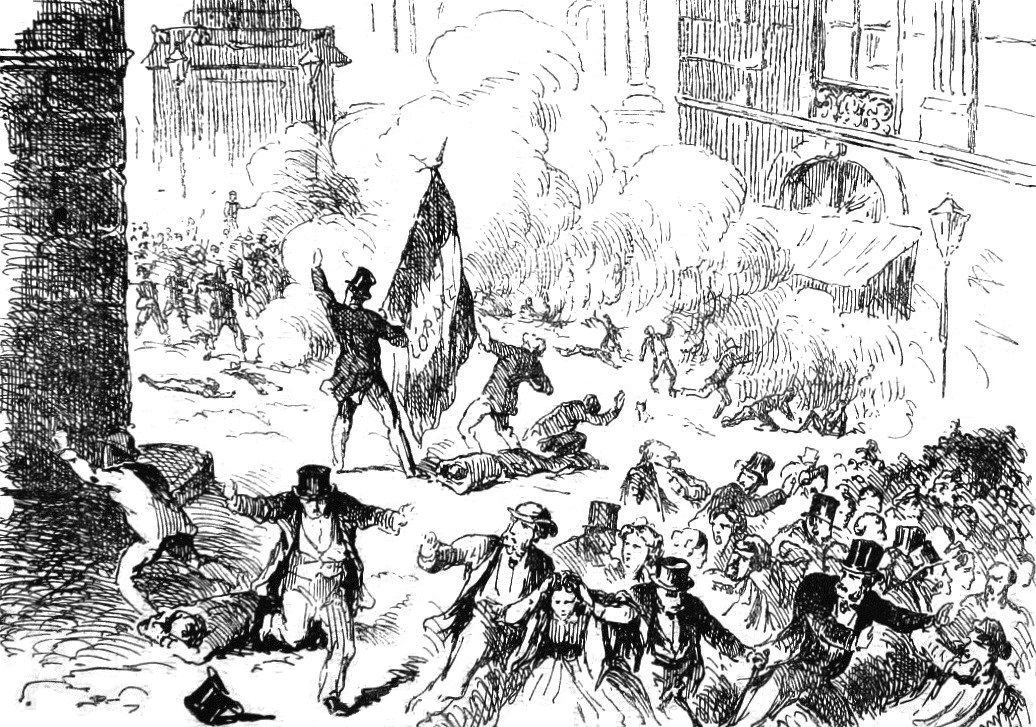 "Manifestations des Amis de l'Ordre (Place Vendôme)".